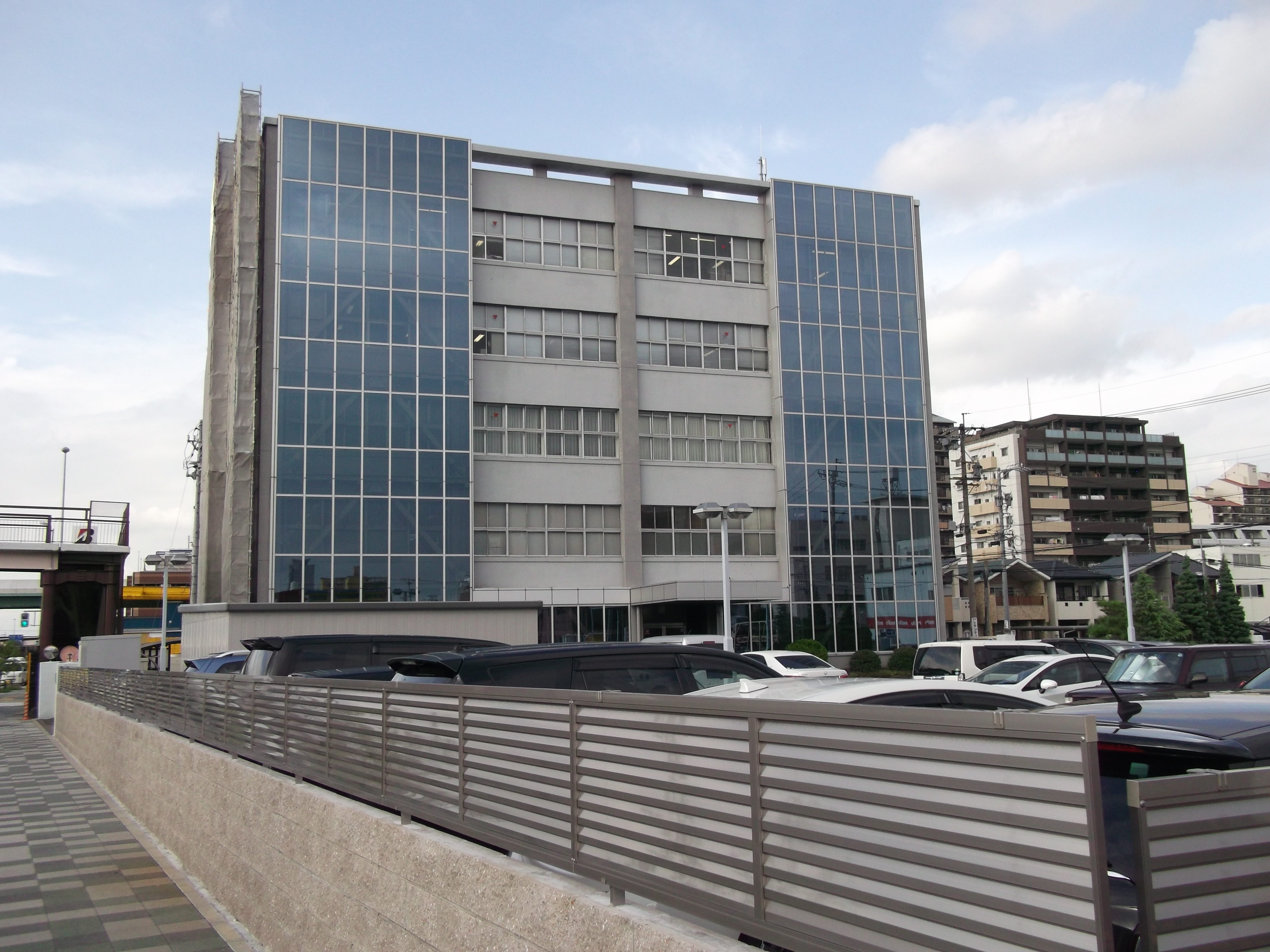 名古屋市西区の名糖産業本社を西側公道南側より撮影